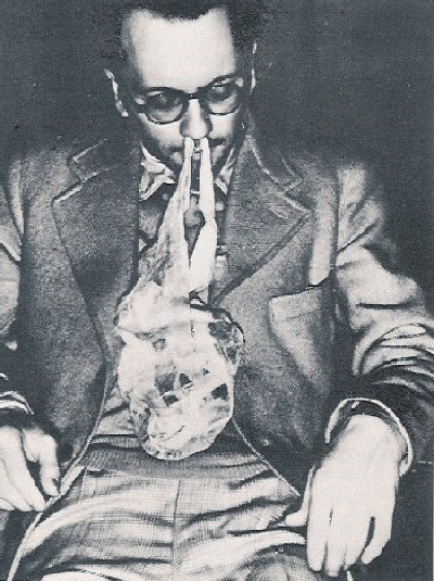 Fake ectoplasm of the self-confessed fraudulent medium Ronald Edwin Cockersell.